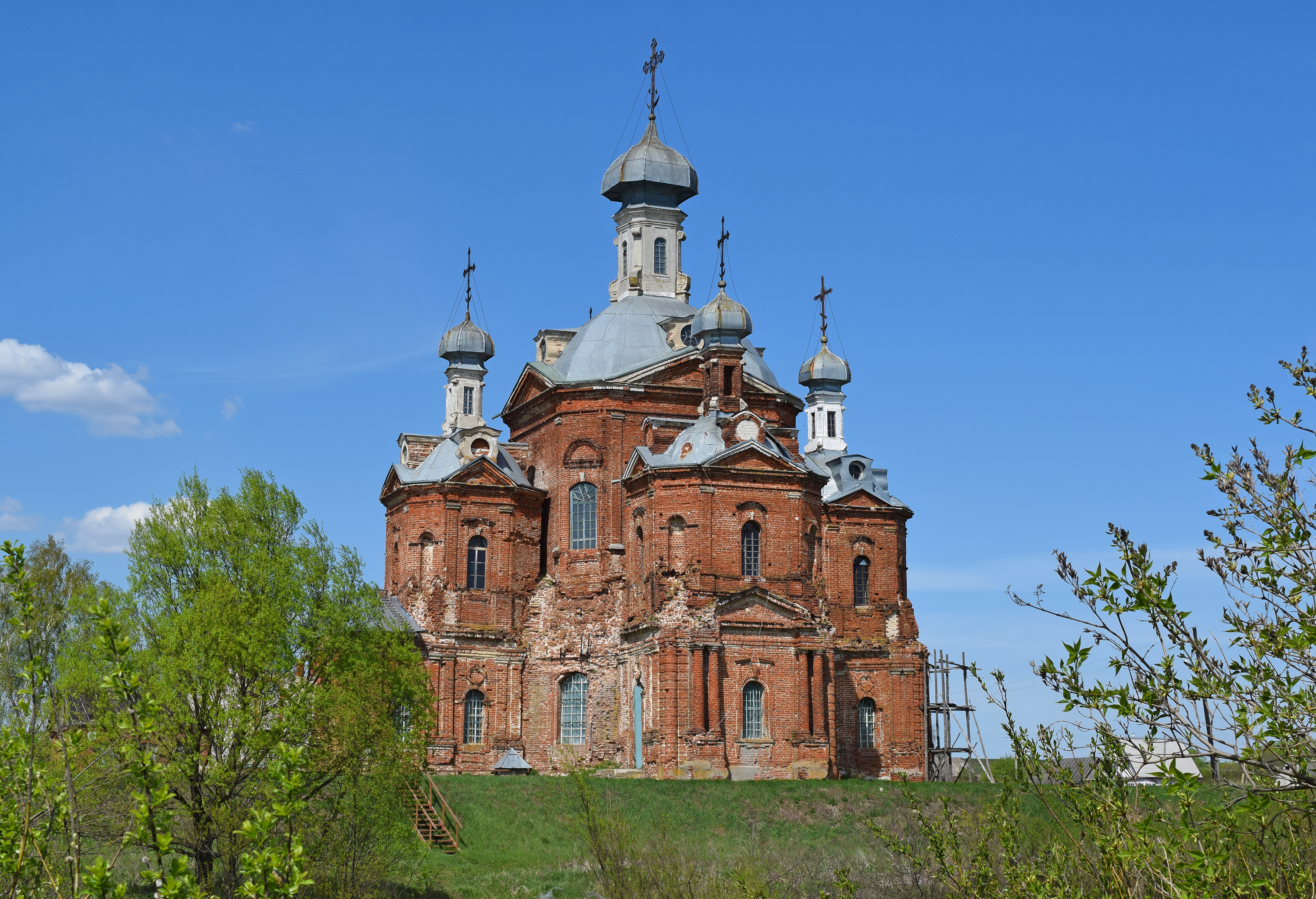 Церковь Покрова Пресвятой Богородицы села Покрово-Гагарино, Милославский район, Рязанская область